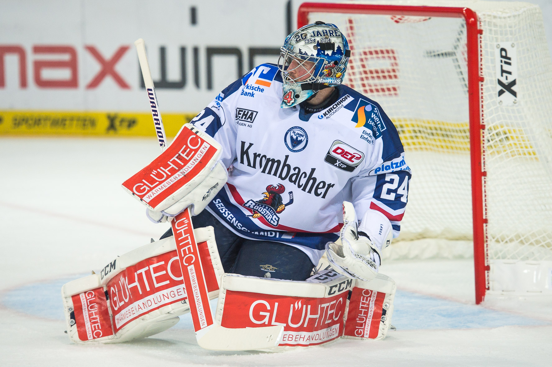 Arena Nürnberger Versicherungen,DEL,Eishockey,Iserlohn Roosters,Mathias Lange